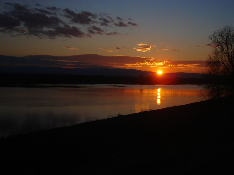 Sava planina isunce